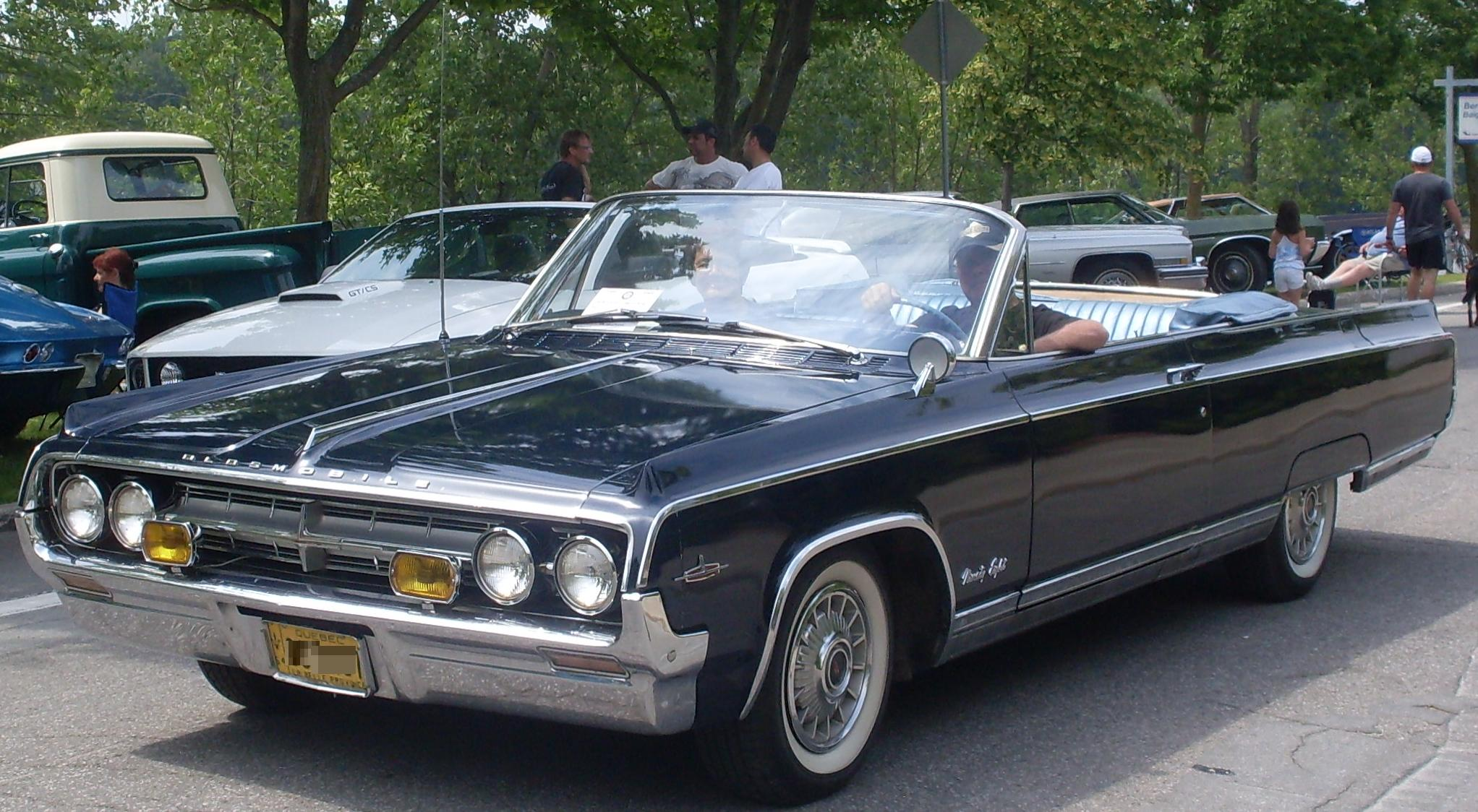 1964 Oldsmobile 98 photographed in Laval, Quebec, Canada at Auto classique VACM Laval.